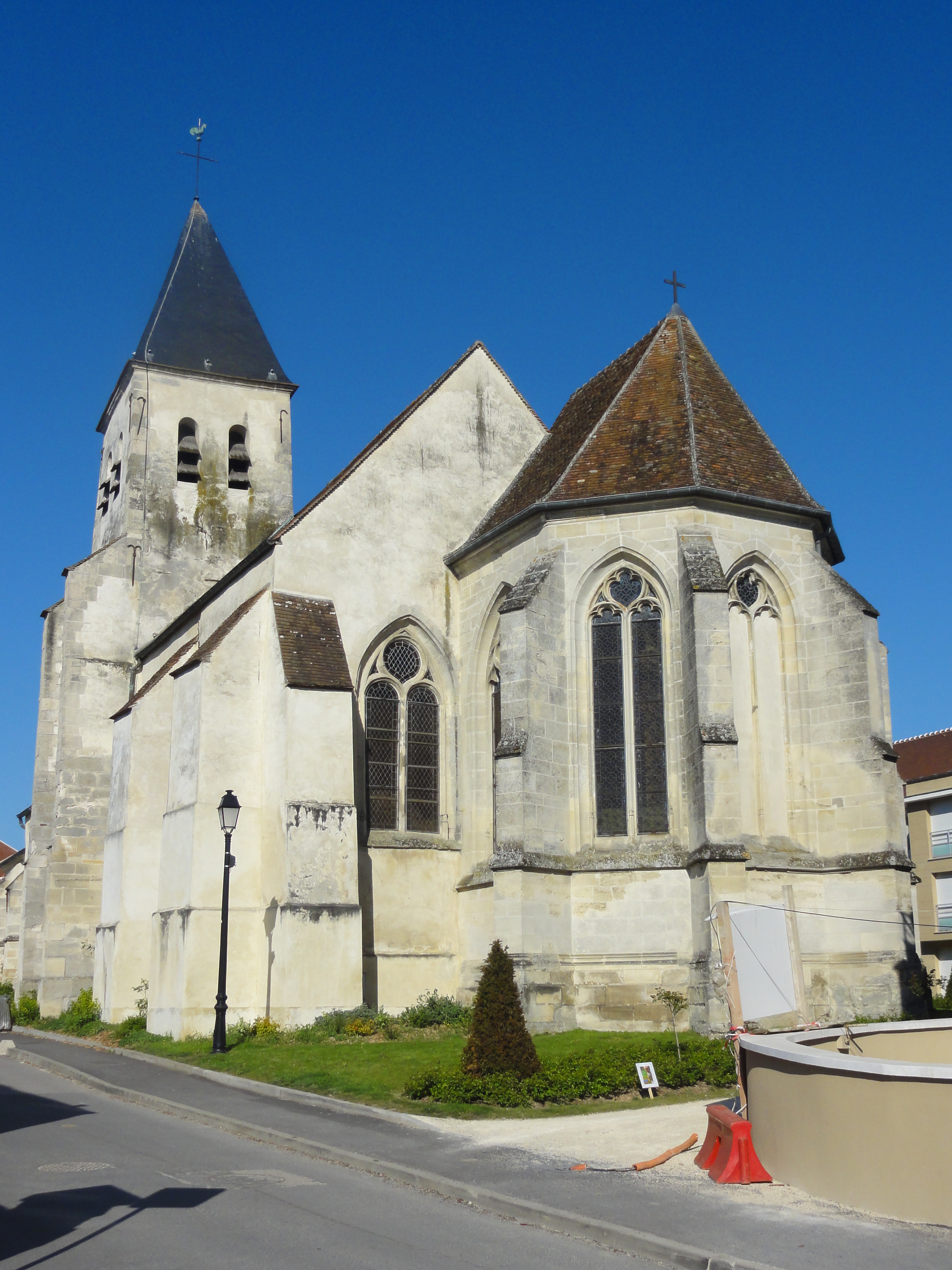 Église Saint-Vincent de Moussy-le-Neuf (voir titre).